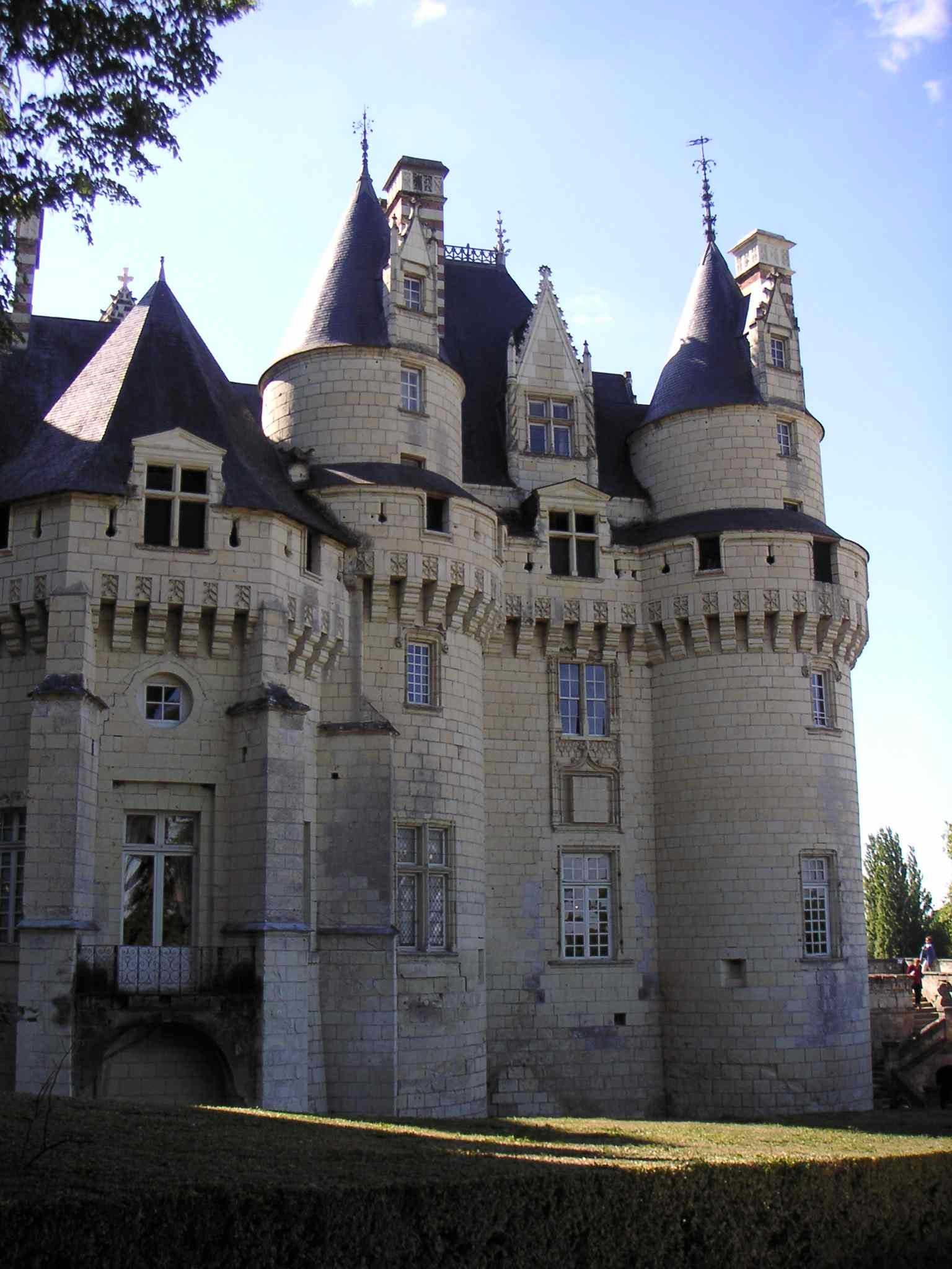 Vue du Château d'Ussé prise par mes soins